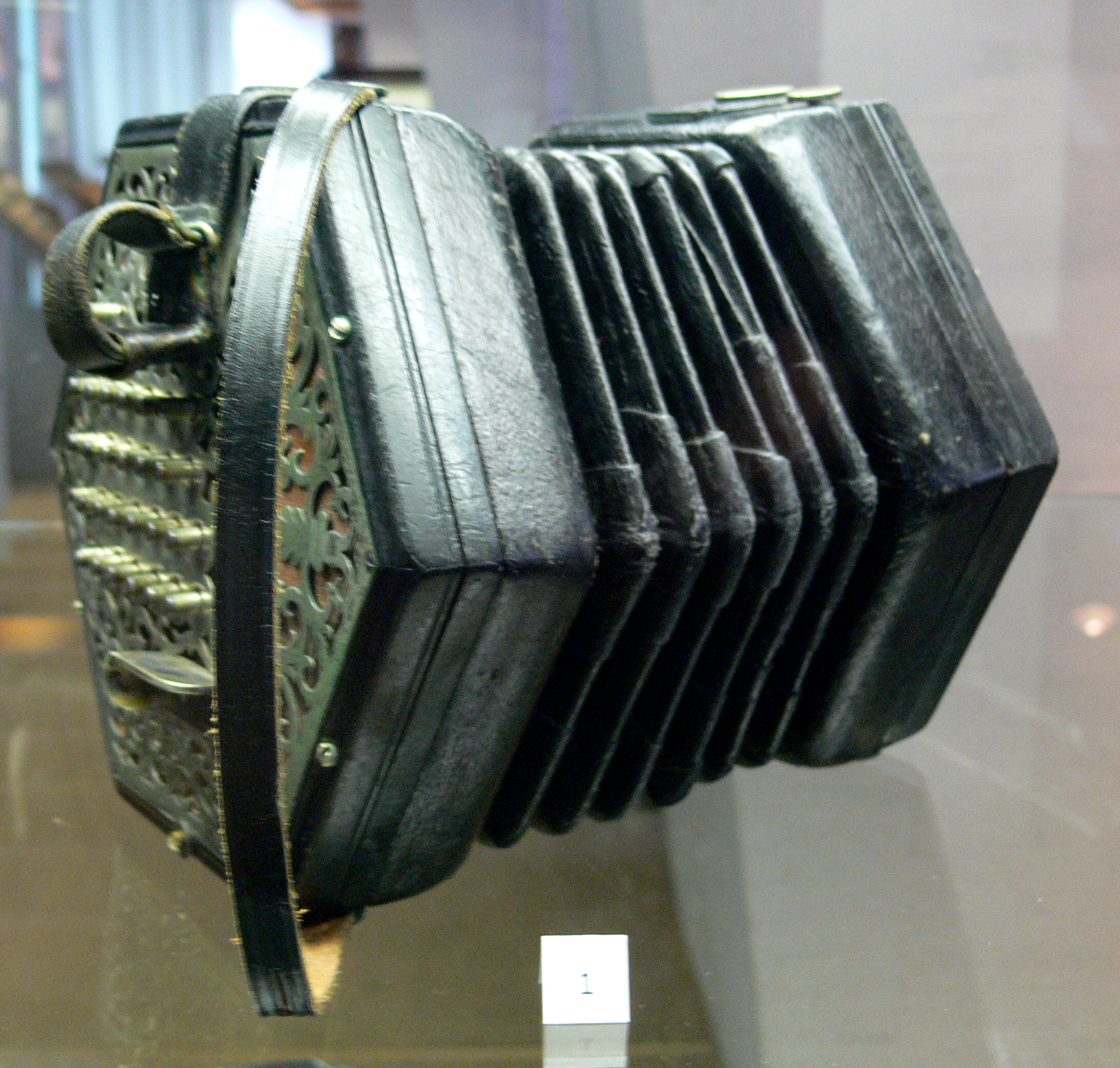 Concertina, Lachenal & Co., England, um 1900 Musikinstrumentenmuseum Berlin, Kat.-Nr. 5458